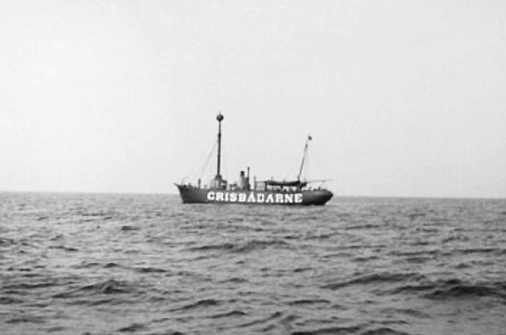 Grisbådarne lightvessel